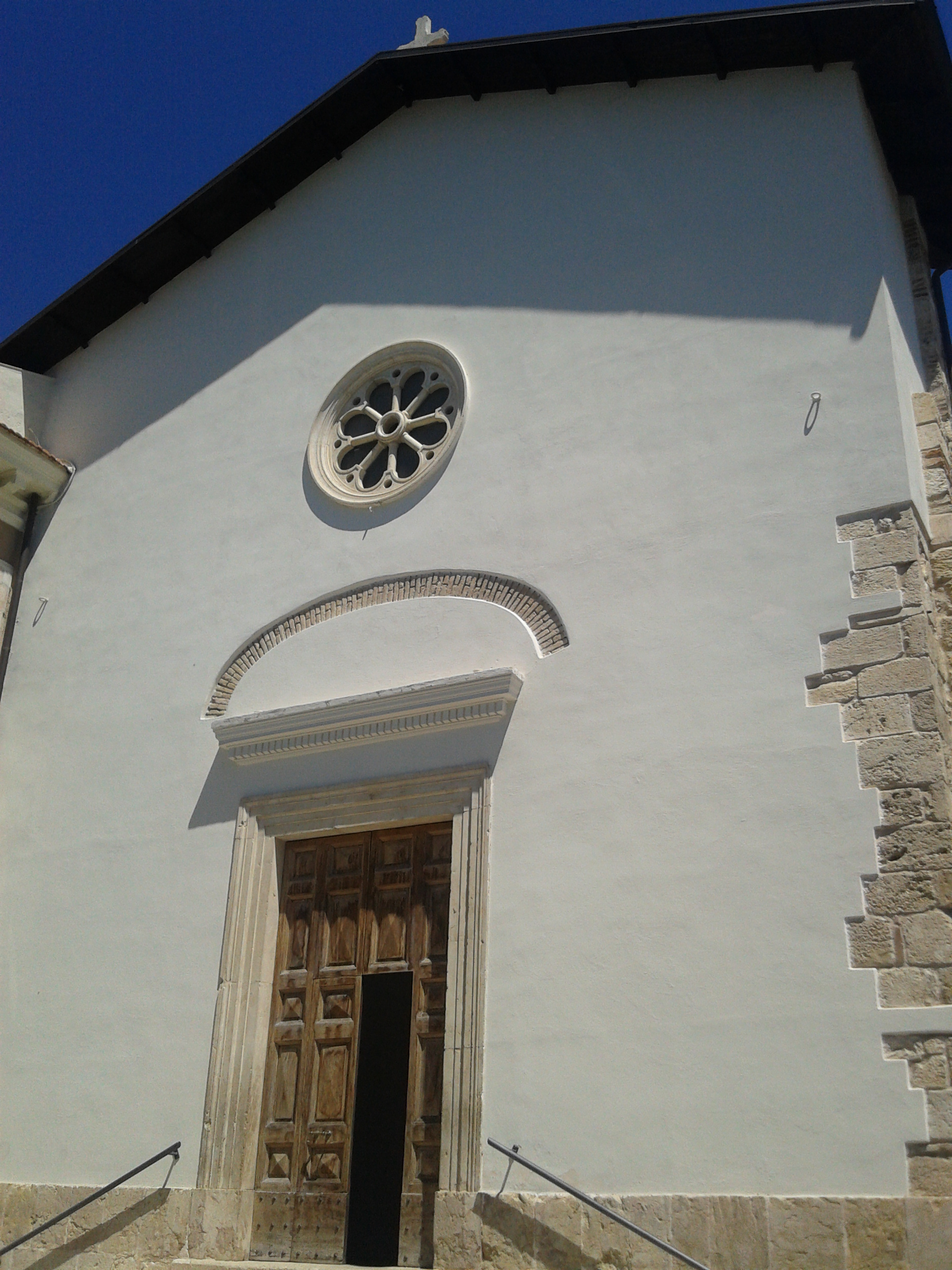 Facciata Chiesa Santa Maria delle Grazie di Cerchio